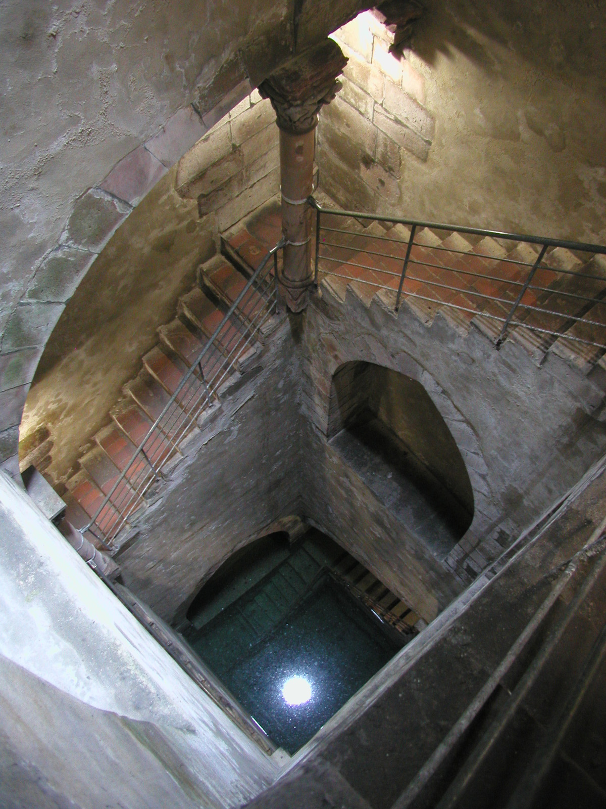 Judenbad Friedberg, Innenansicht